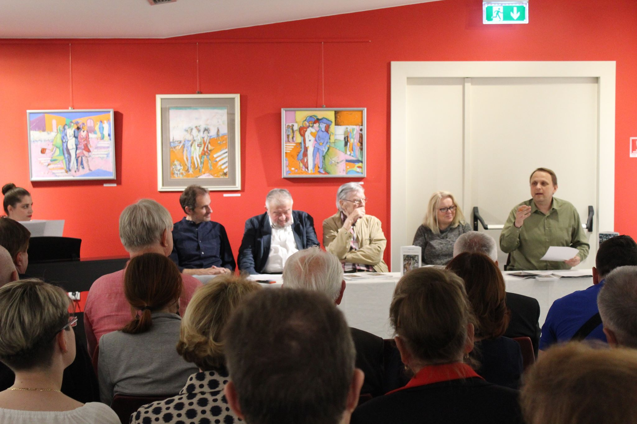 Na slici se vide, s lijeva na desno: Dubravko Sušec, mr. Ernest Fišer, Zlatko Crnec, dr. Božica Pažur, Ante Vranković. U publici se vide i dr. Ivo Kalinski, Mirko Švenda - Žiga, Dubravko Sidor.